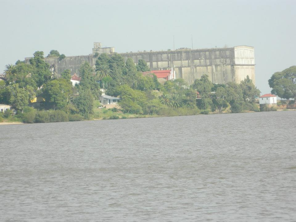 Complejo Industrial Anglo (instalación fabril y puerto) Barrio Anglo, La Pandilla, Zona del Golf, Camino de Tropa, Corrales, Zona de las Romerías Basurero Histórico, Zonas naturales: barrancas y espacios verdes. Ubicada en el departamento de Río Negro